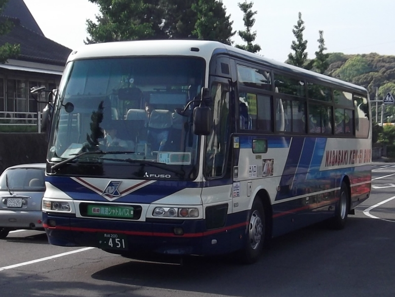 長崎県営バス「高速シャトルバス」